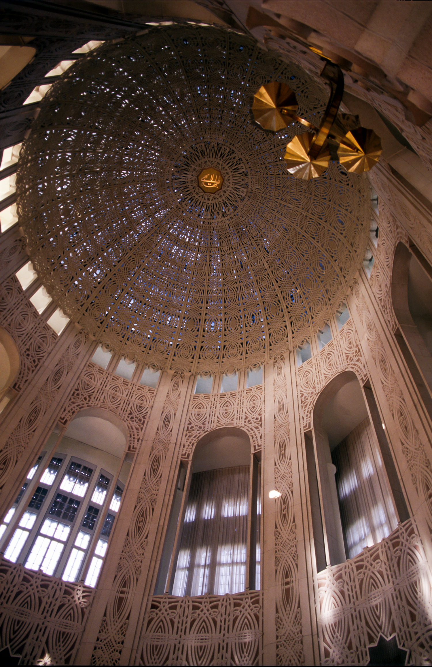 הכיפה של בית התפילה הבהאי באילינוי, ארה"ב.